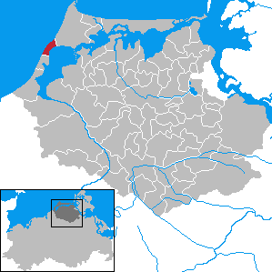 Ahrenshoop in Mecklenburg-Vorpommern - District Nordvorpommern